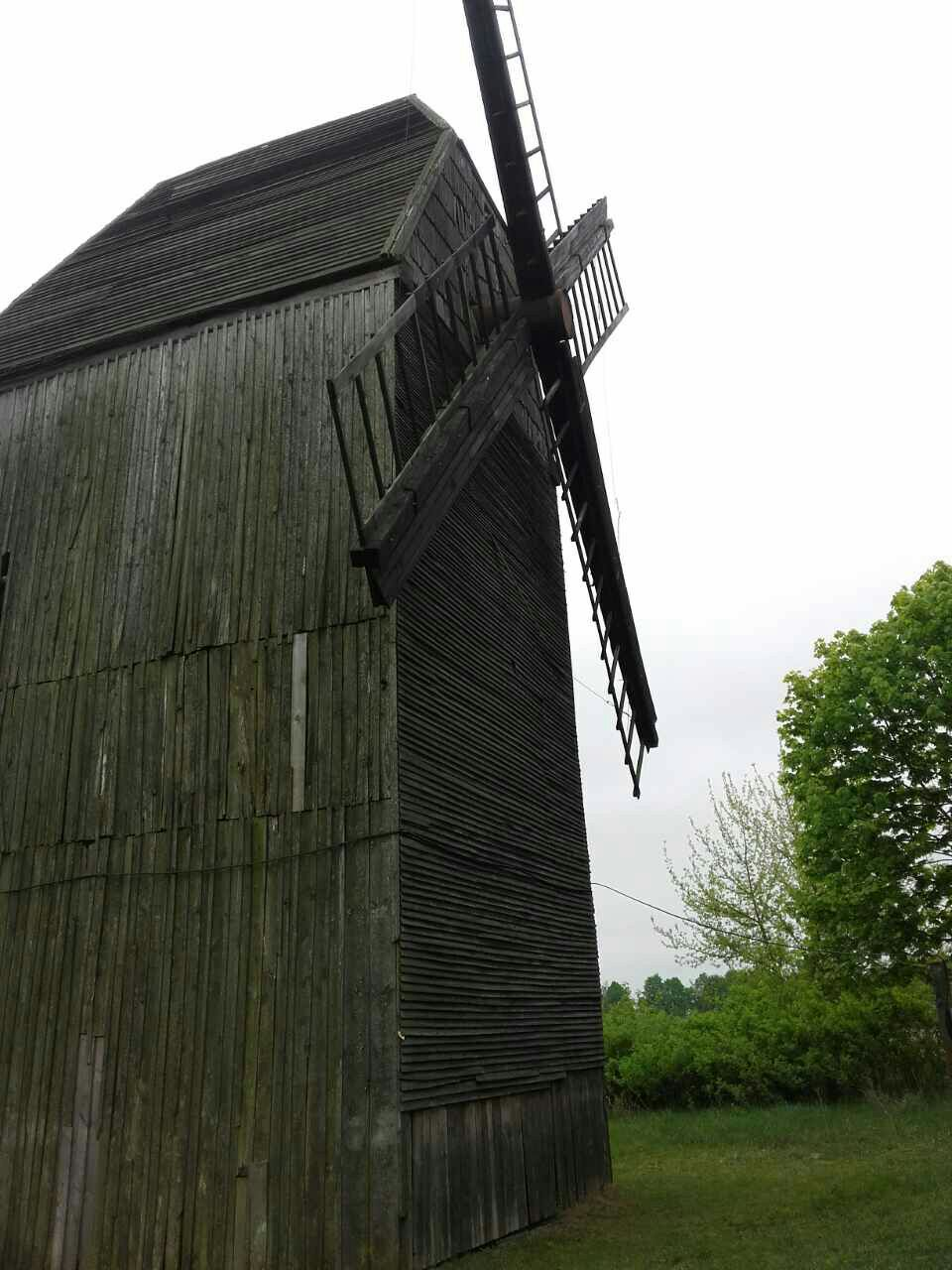 Mühle im Museumsdorf